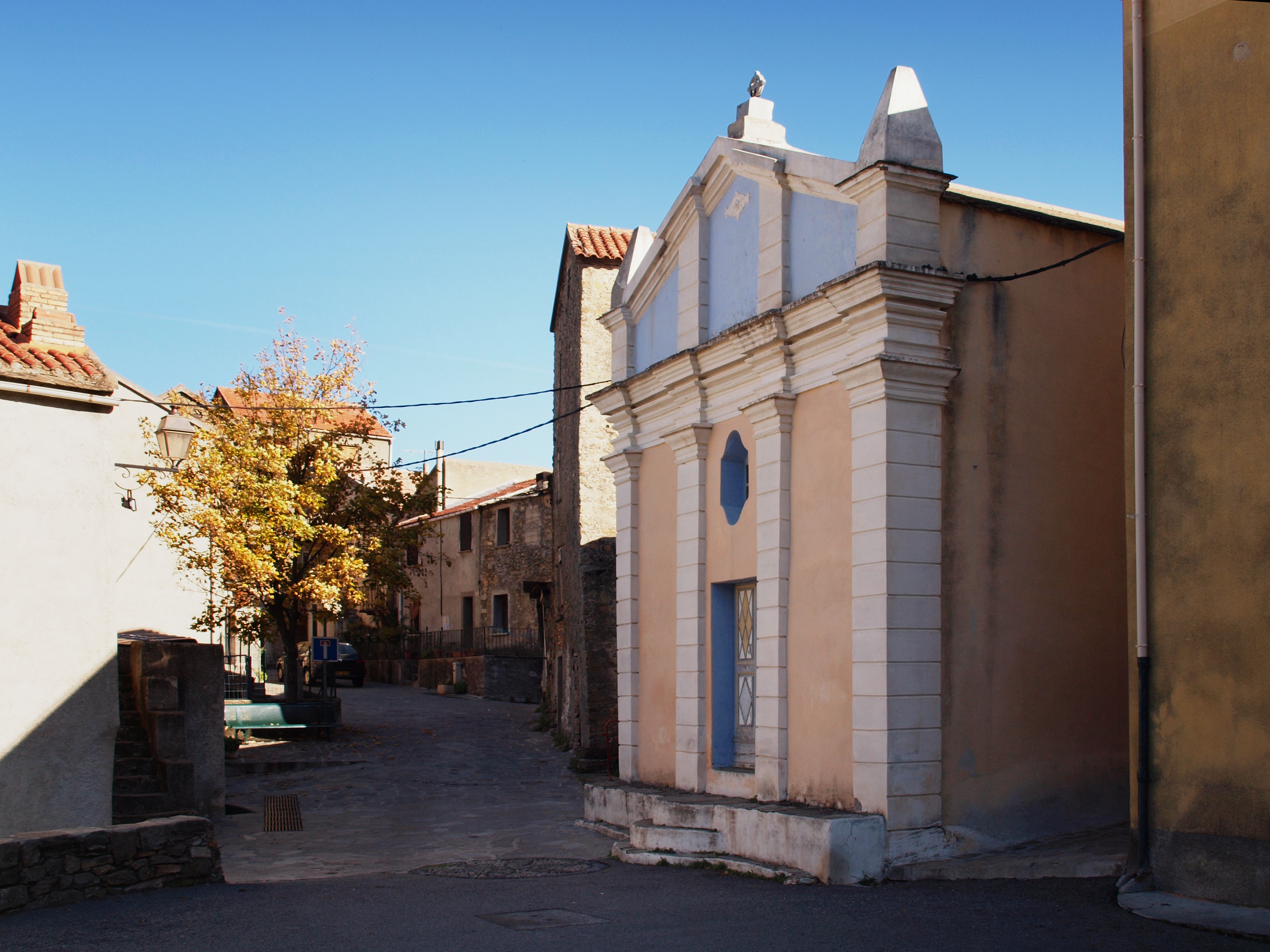 Poggio-di-Venaco (Corsica) - Chapelle San Roccu